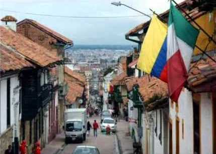 Italiani in Bogota